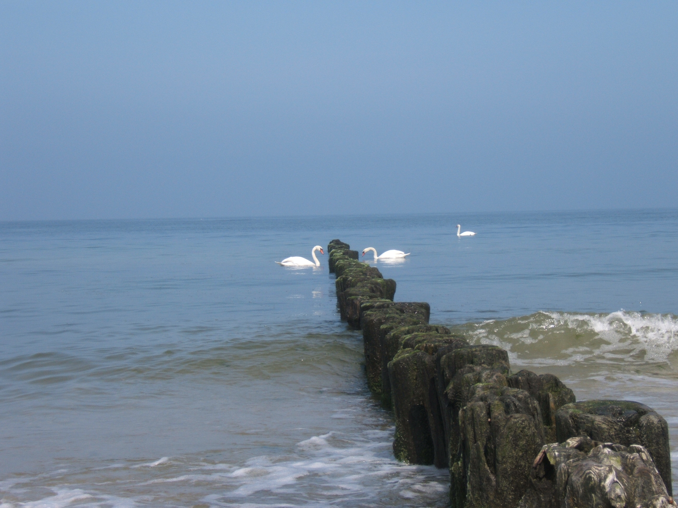 Podczele/Kołobrzeg/Poland. Beach.May2007